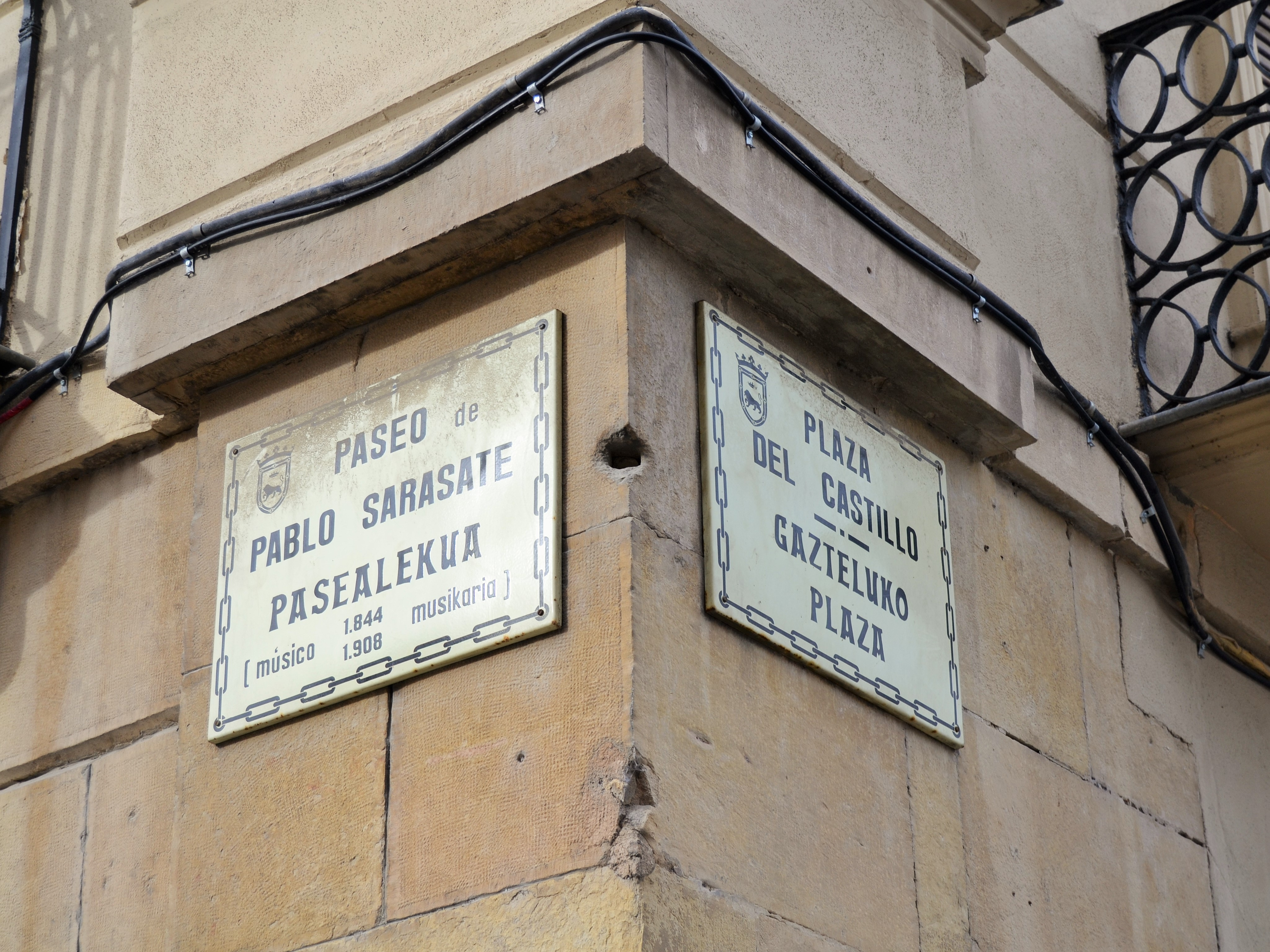 Sarasate pasealekua - Gazteluko plaza, plaques.